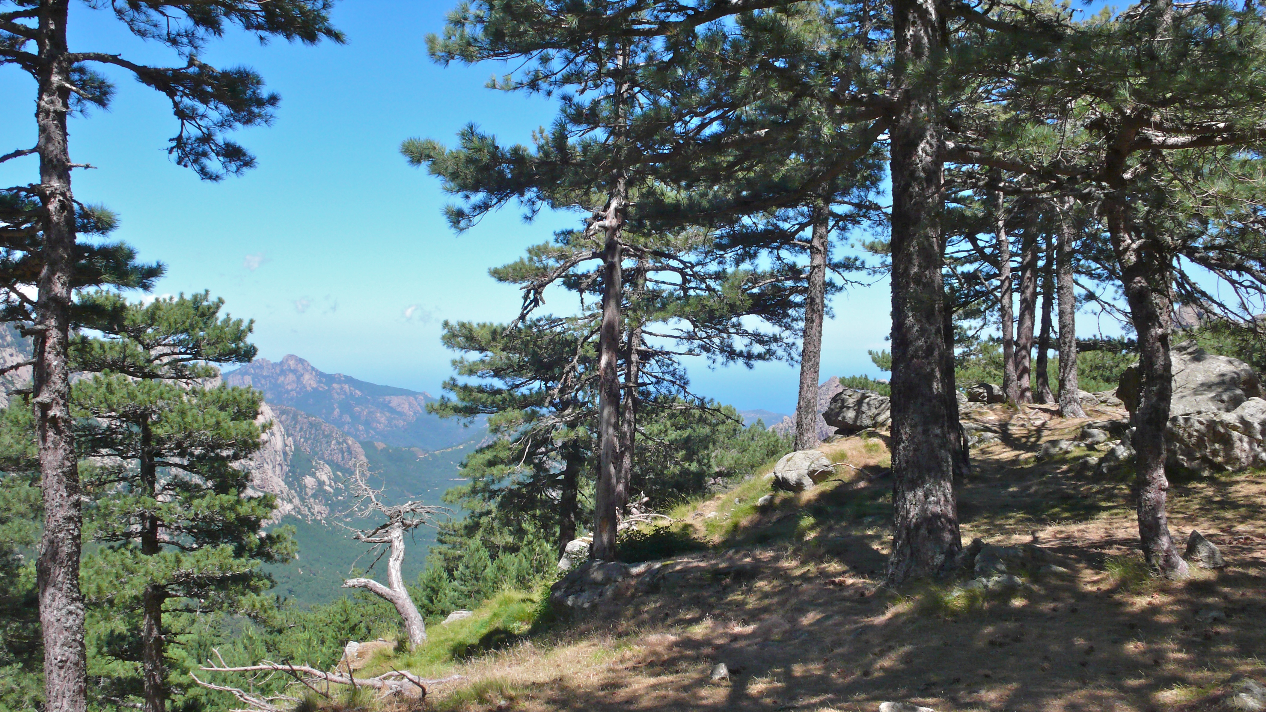 Pinus nigra var. corsicana, Corsica